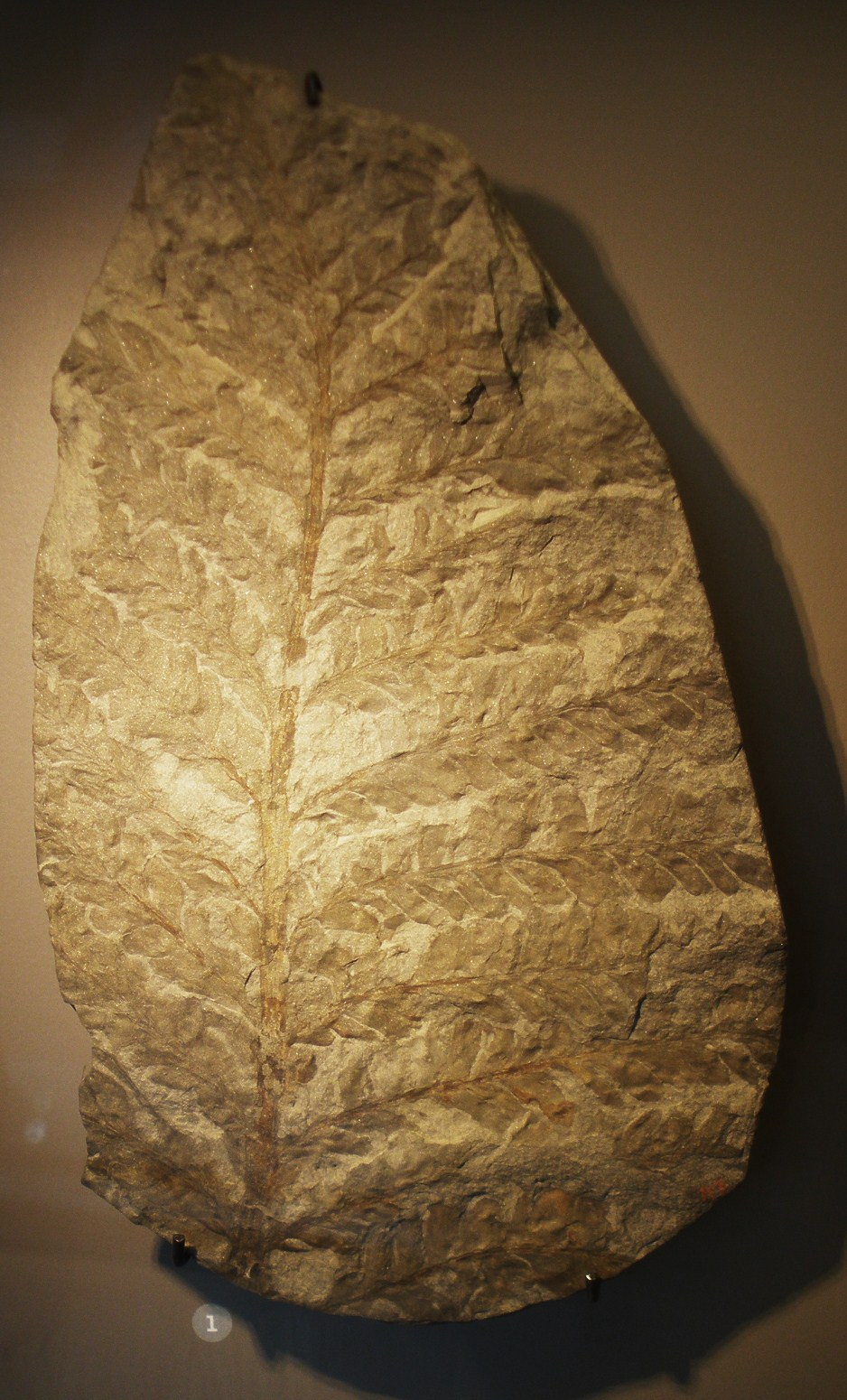 Fossil of Archaeopteris, an extinct plant Took the photo at Musee d'Histoire Naturelle, Brussels